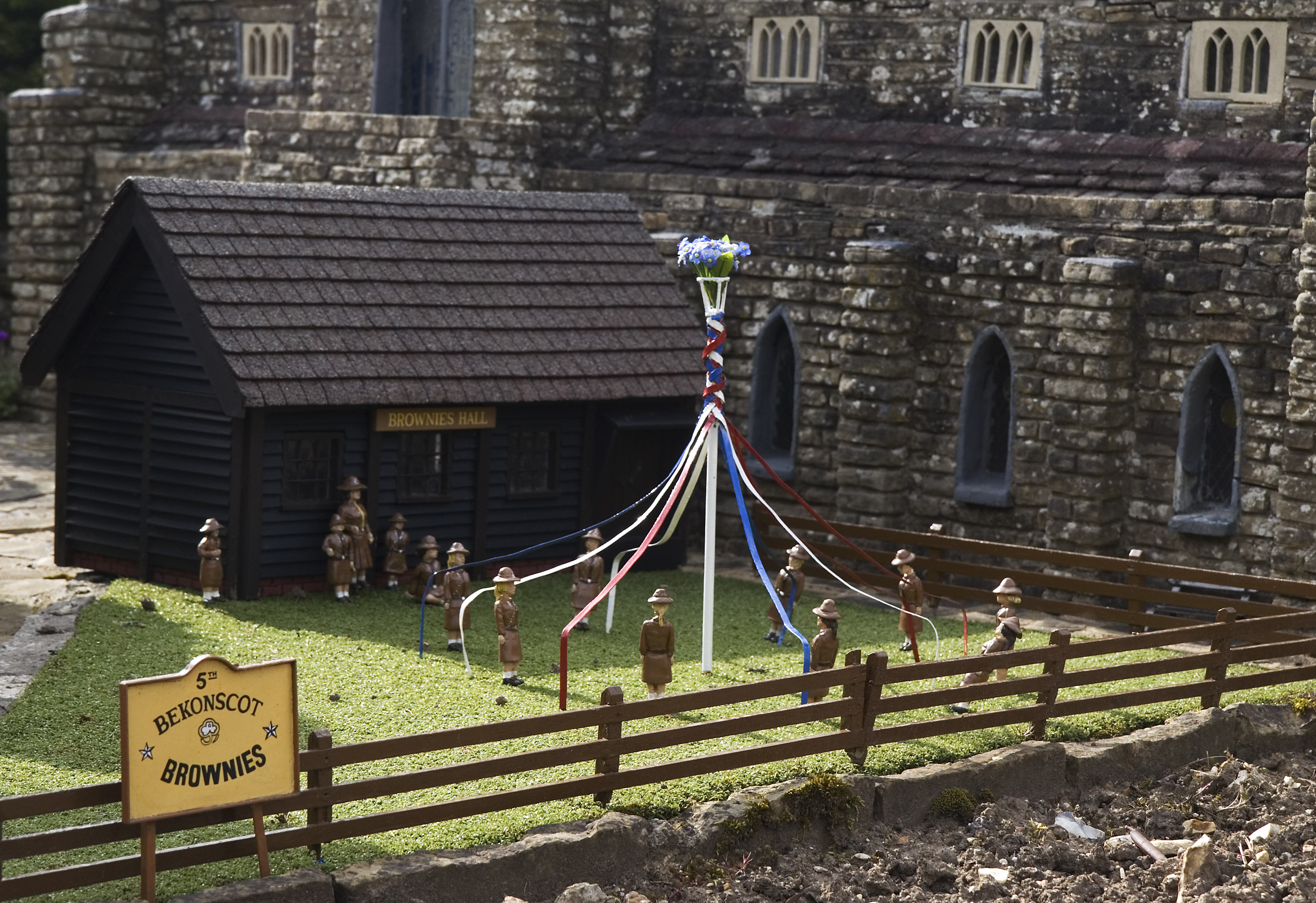 Brownies and maypole, Bekonscot